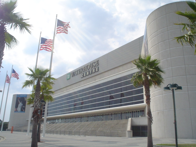 Photo du TD Waterhouse Centre; Prise par User:Flcelloguy le 10 mai 2006 à 19:31 (UTC) et libre sous les conditions de GFDL. Trouvé sur